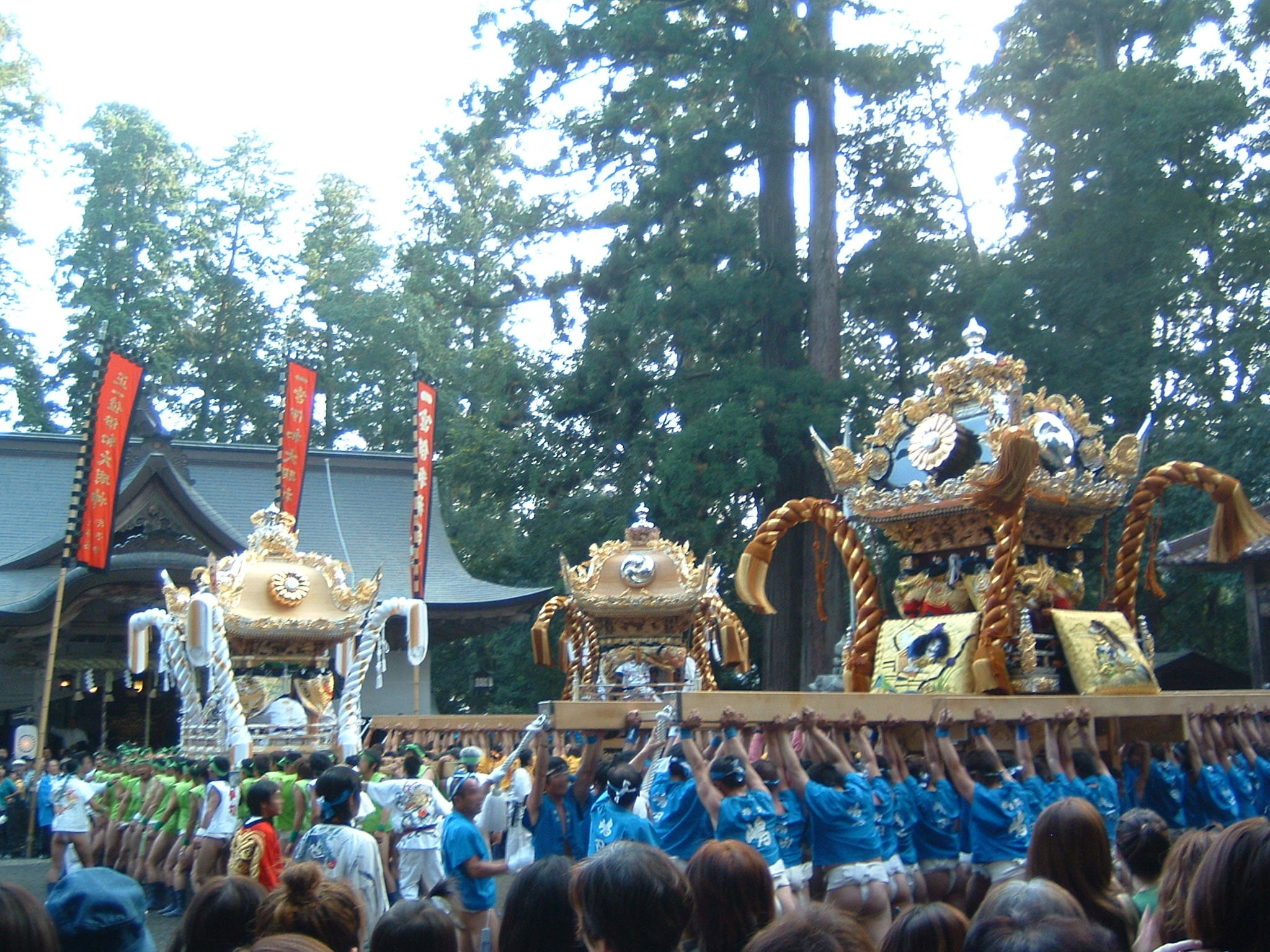 Iwa-jinja(伊和神社) akimatsuri(Autumn festival)